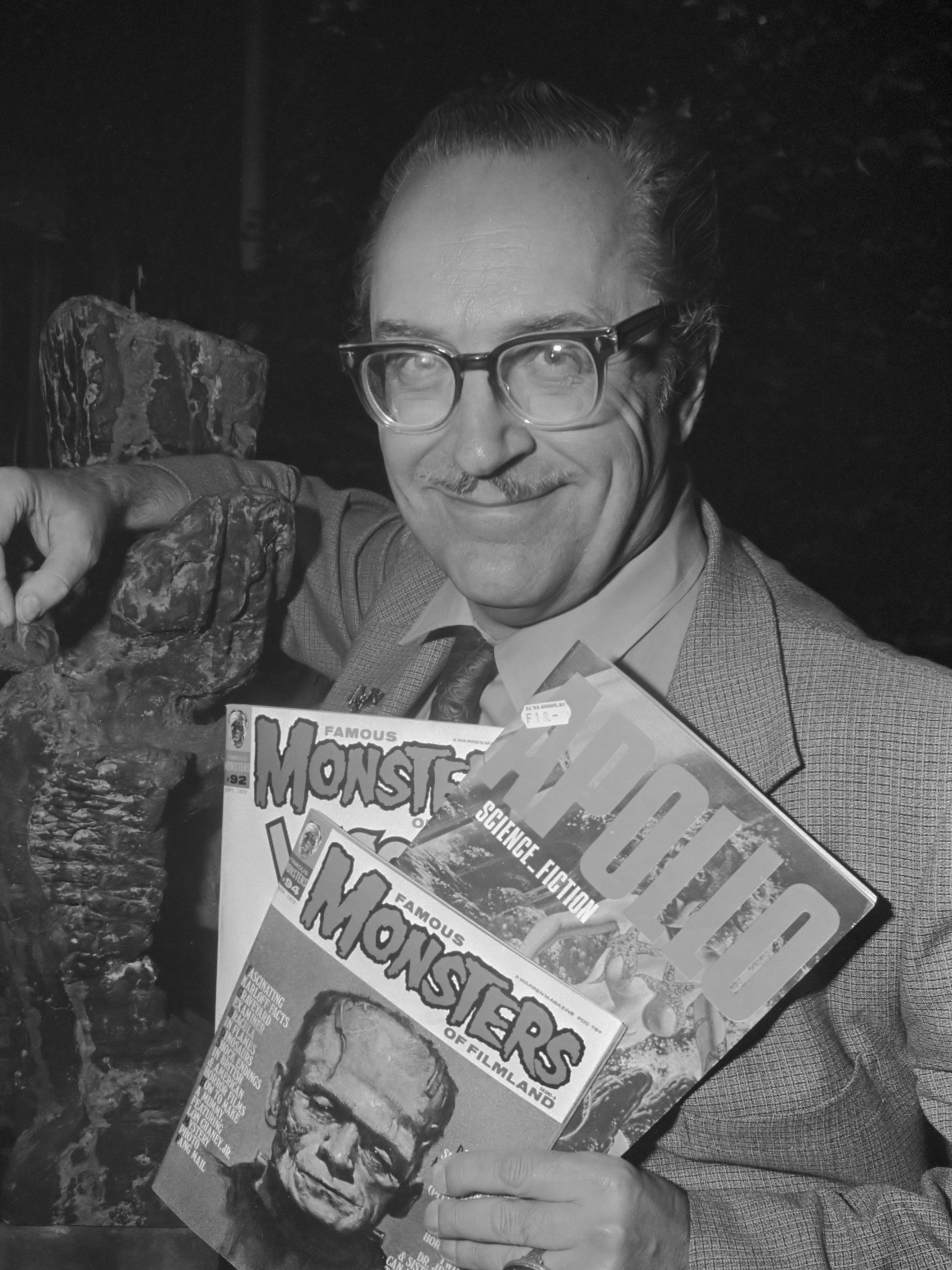 Forrest J. Ackerman op persconferentie Nederlands contactcentrum voor Science Fiction 22 augustus 1972